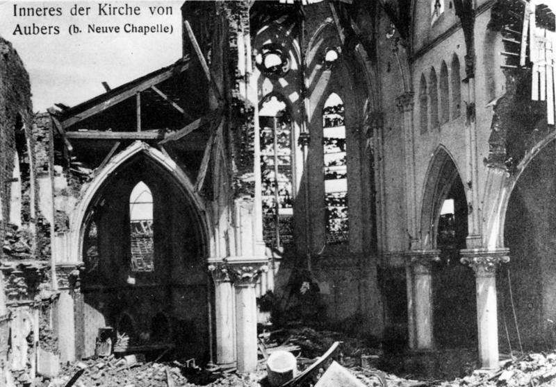 Inneres der Kirche von Aubers (b. Neuve Chapelle)